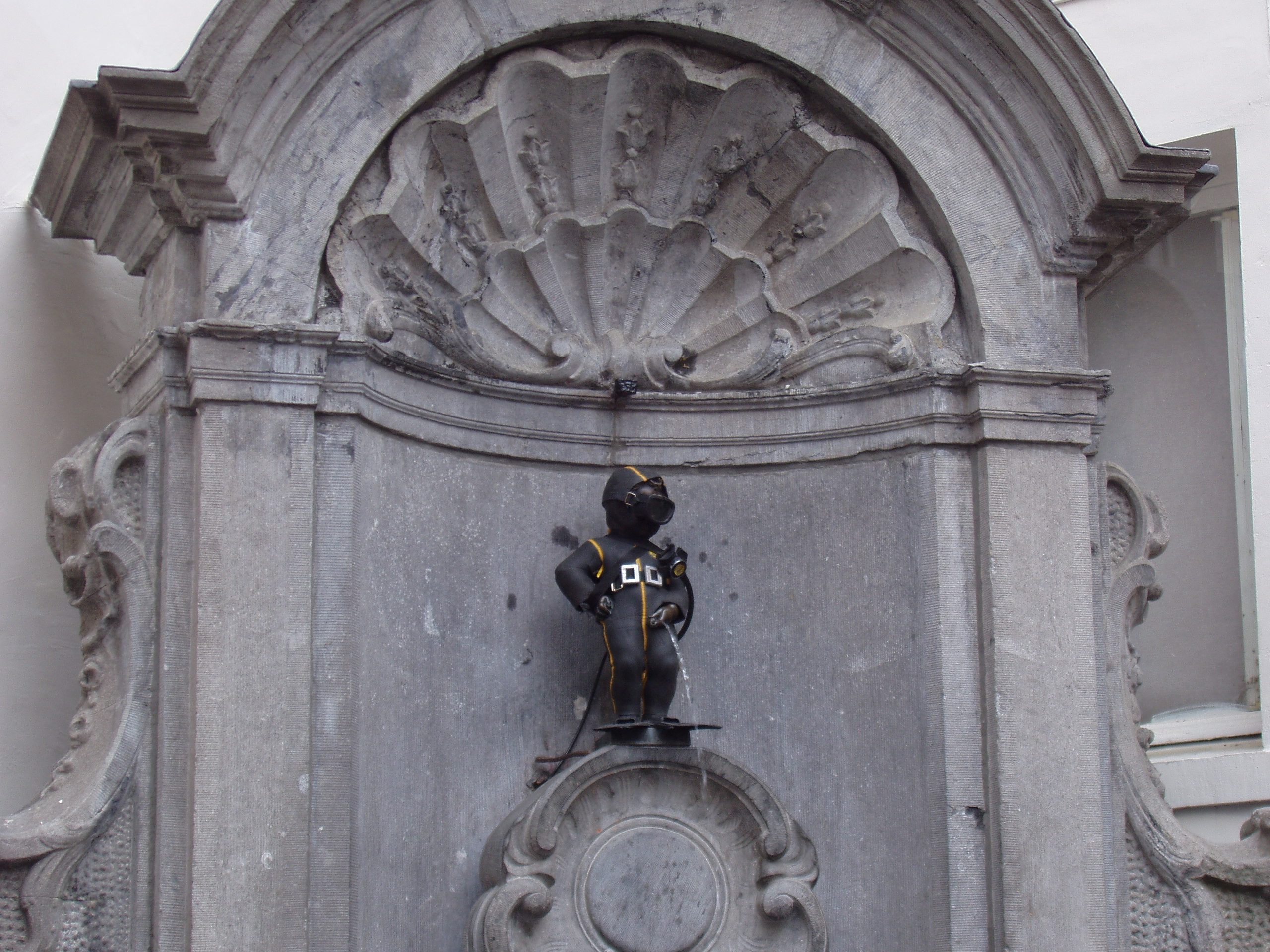 Manneken Pis in diving suit (April 2007)